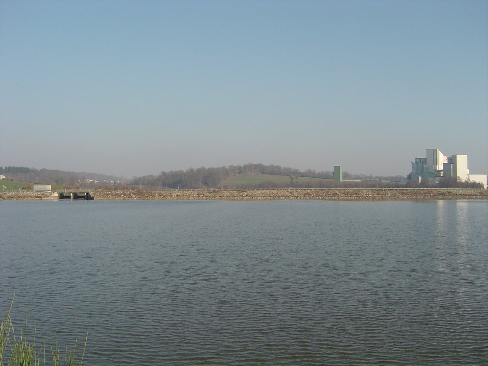 Le plan d'eau de la Cantache est situé entre Montreuil-sous-Pérouse et Champeaux à l'Ouest de Vitré. Il est limité par un observatoire d'oiseaux au Nord et le barrage de la Cantache au Sud. Les trois barrages autour de Vitré (Valière, Haute-Vilaine et Cantache) sont des barrages écrêteurs de crues. Les barrages de la Valière et de la Haute-Vilaine servent également de réserve d’eau pour l’alimentation en eau potable. C'est un spot de repli intéressant pour le funboard dans la région de Vitré grâce notamment à son effet venturi. Au fond, à gauche de la photo, on aperçoit la bourg de Montreuil. Au centre, la route Vitré - Combourg sépare le barrage. À gauche se trouve l'usine d'aliments pour bétail situé dans le village de "Gérard".